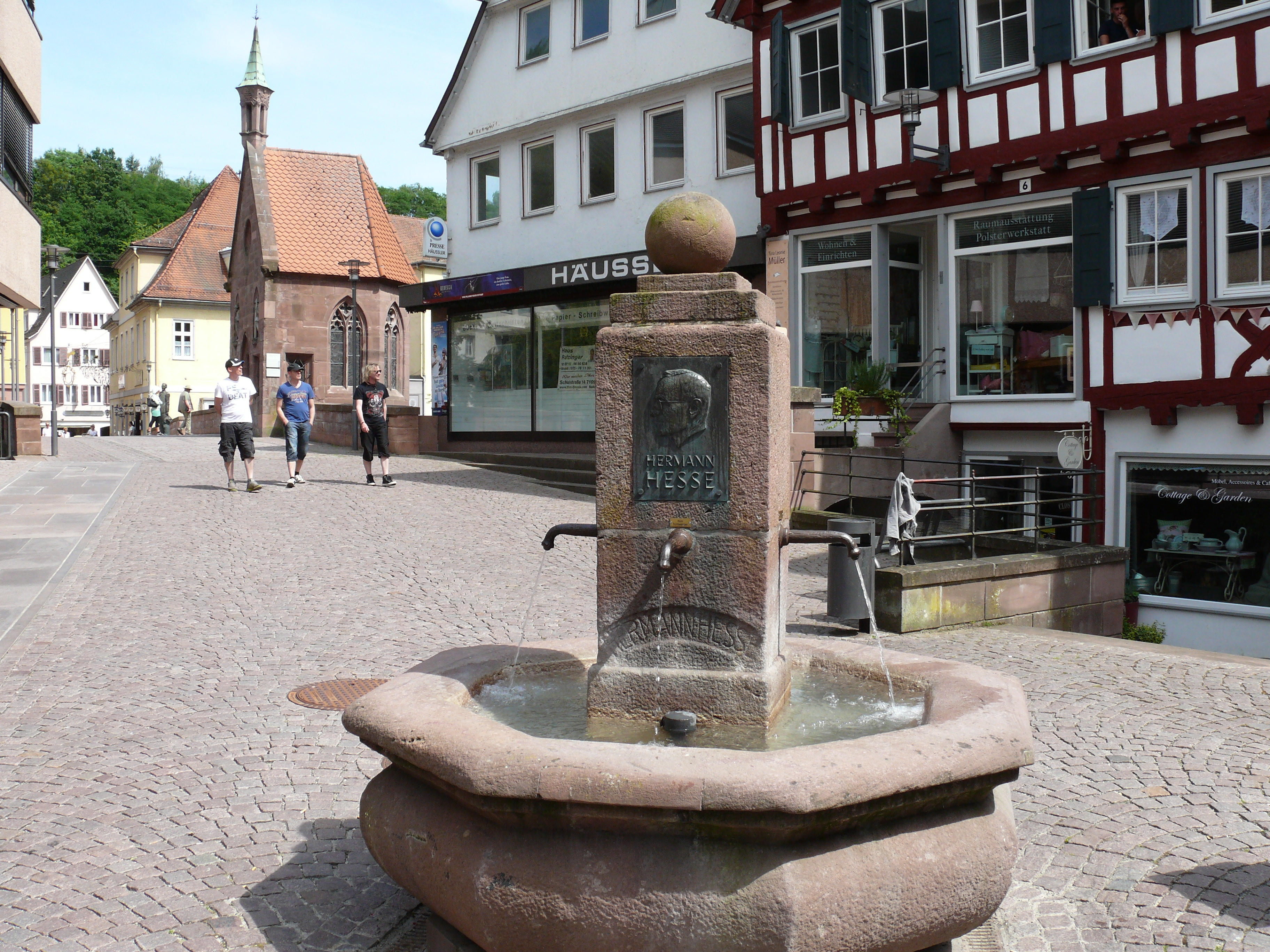 Brunnen zur Ehren von Hermann Hesse, auf dem gleichnamigen Platz in Calw. Die Nikolauskapelle auf der Nikolausbrücke links, daneben links wiederum steht seine Bronzefigur.